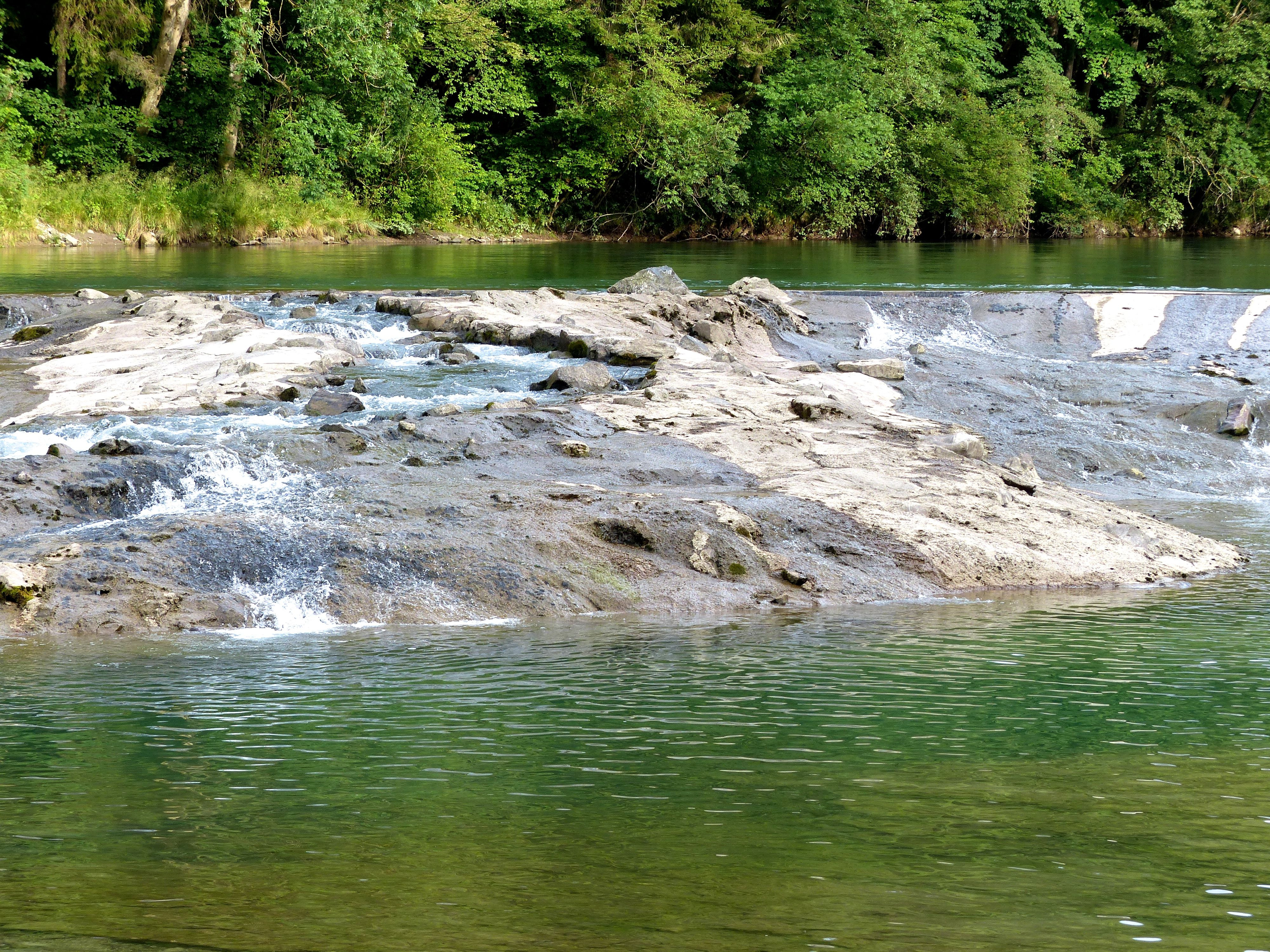 Felsrippe in der Iller im südlichen Stadtgebiet von Kempten